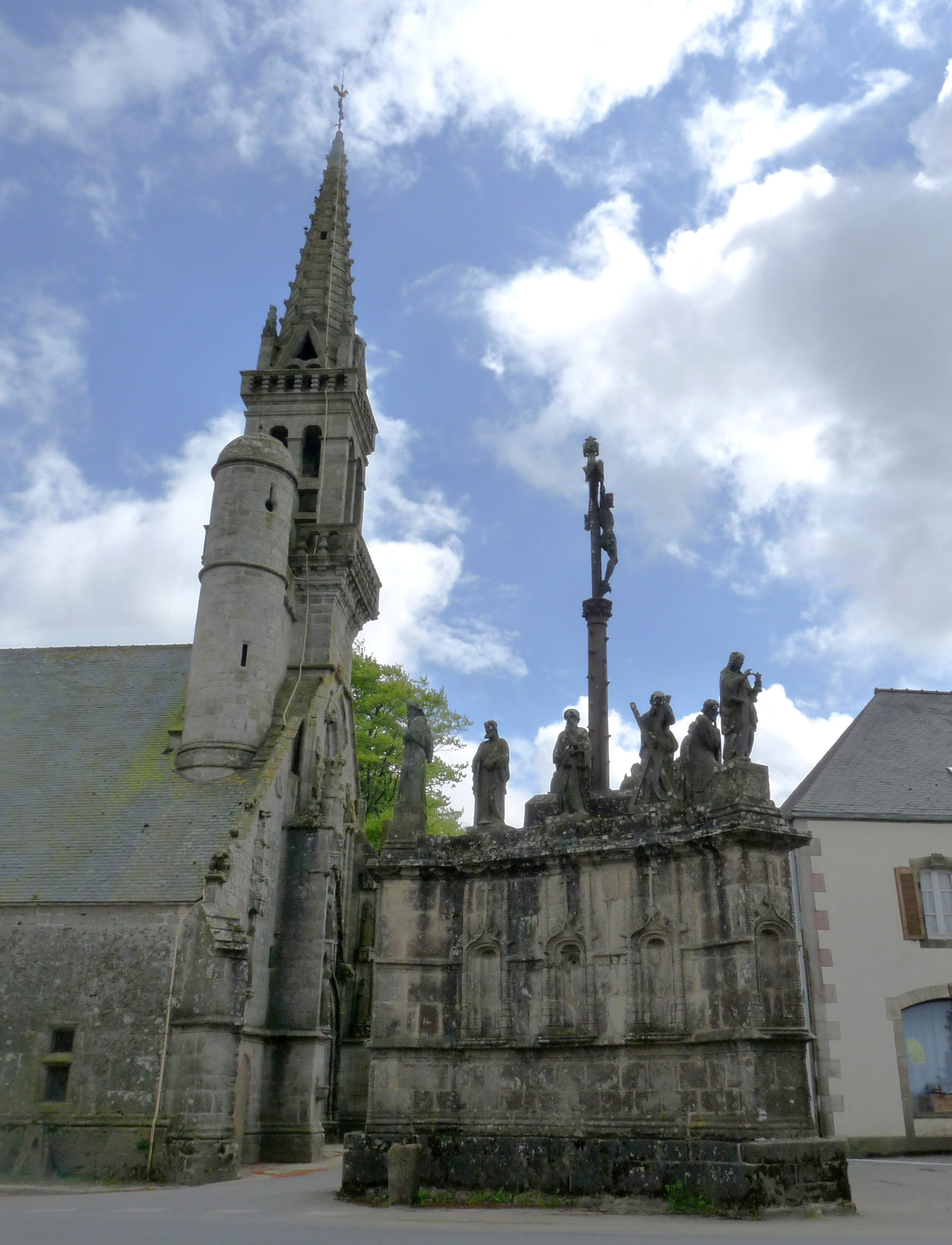 Confort-Meilars (Finistère, Bretagne) : l'église et le calvaire dans un carrefour